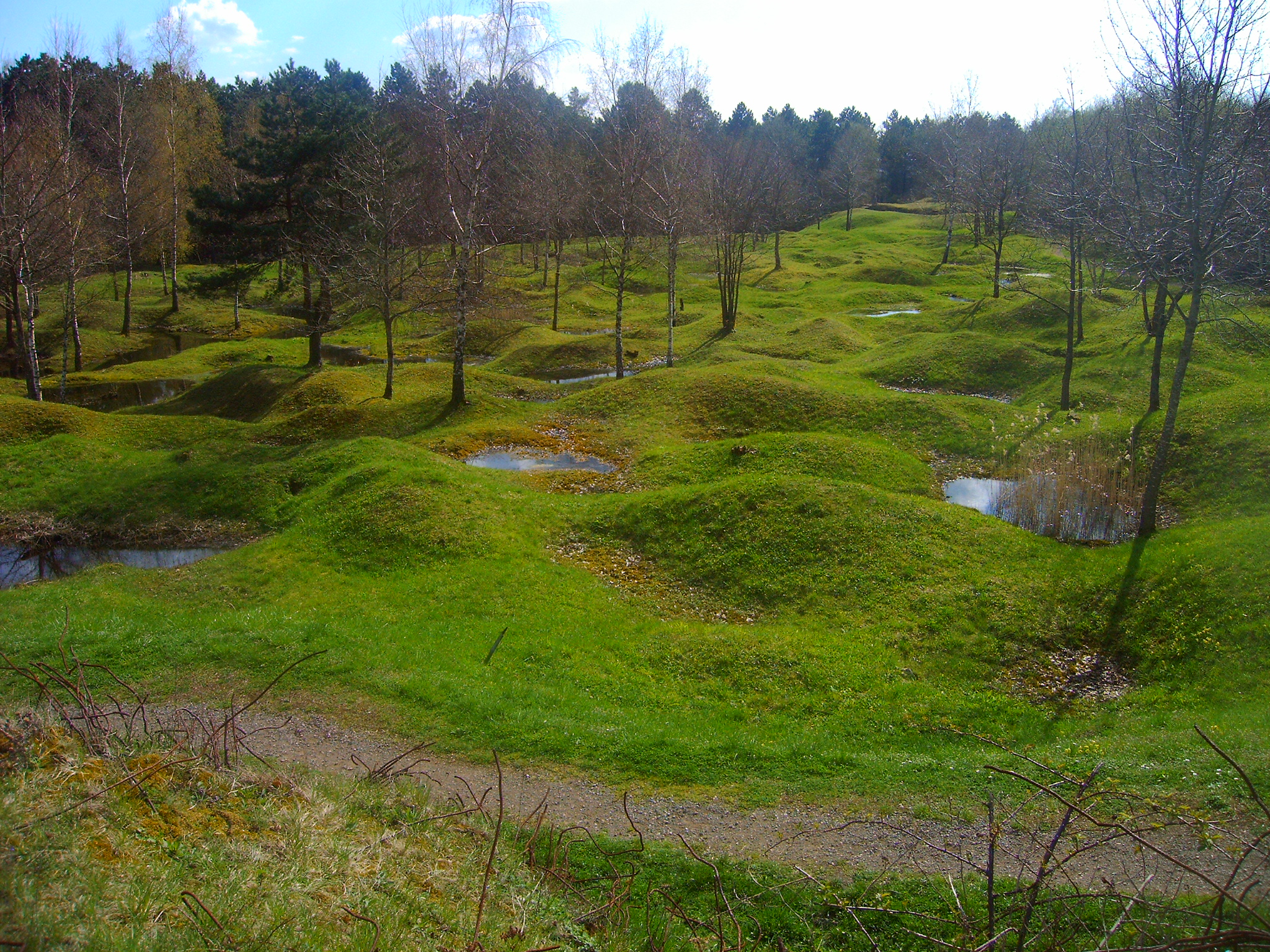 Un champ de bataille de Verdun pendant la guerre 1914-1918 qui conserve les impacts d'obus